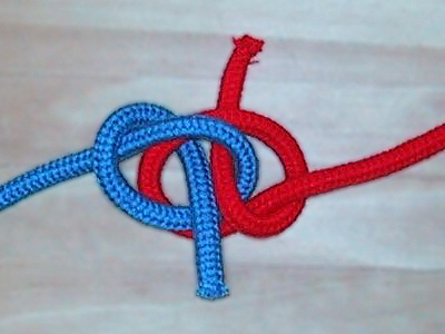 Zeppelin Bend / Zeppelinstek